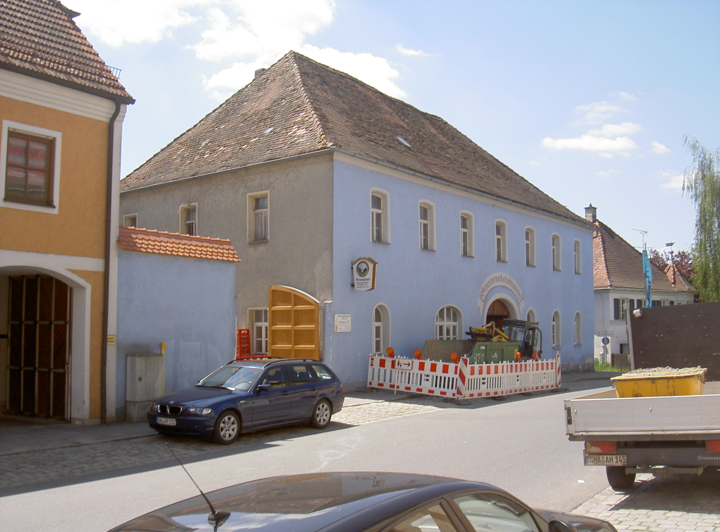 Denkmalgeschütztes Haus in Rötz Hussenstraße 17